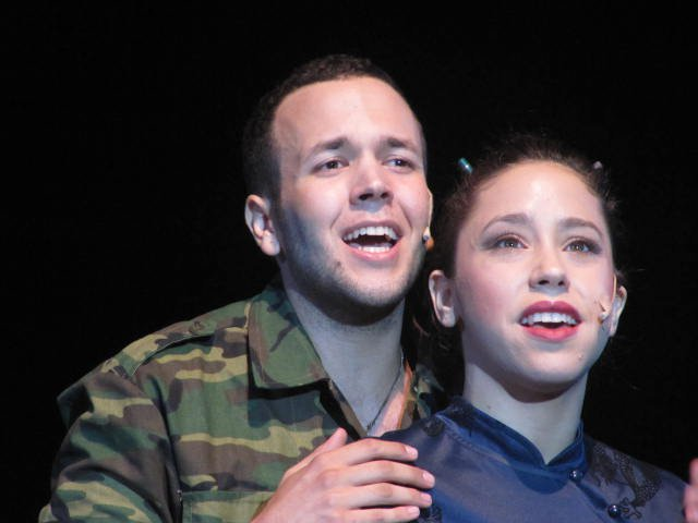 מתוך גמר תחרות מלגות ג׳ורג׳ וואל 2010 צילום: אלי לאון